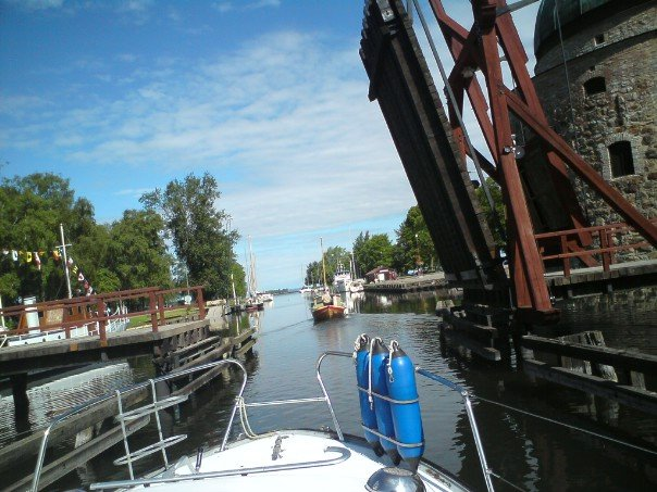 Vadstena slott, vindbryggan